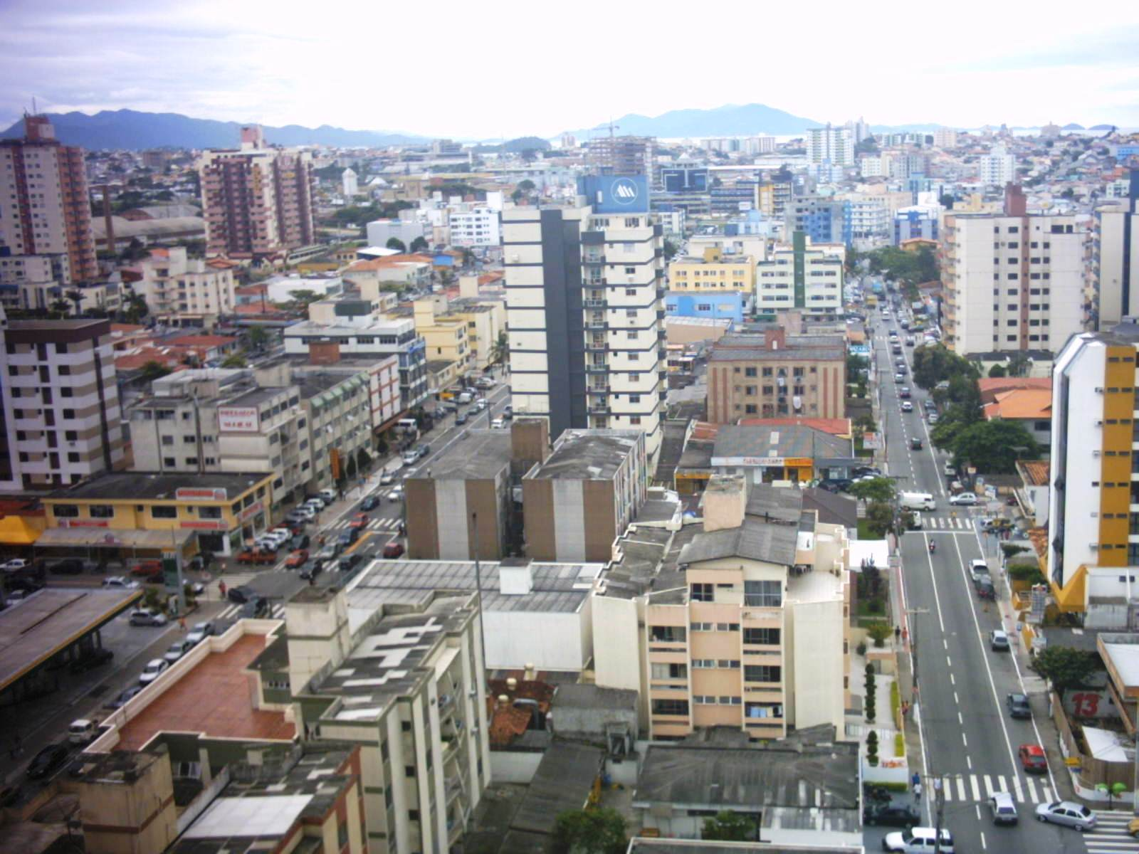 Vista para o bairro Kobrasol, de São José, Santa Catarina, Brasil